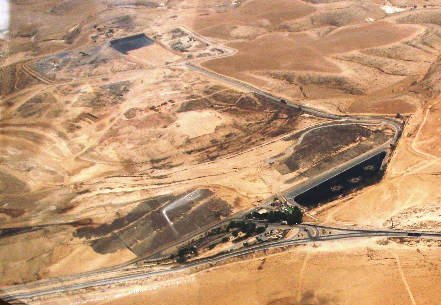 אתר הטמנת הפסולת דודאים בנגב ממבט ציפור